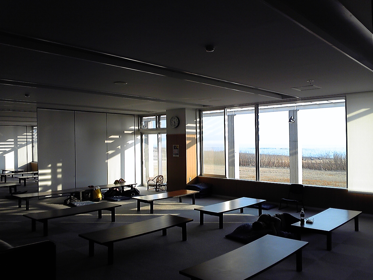 特になし。